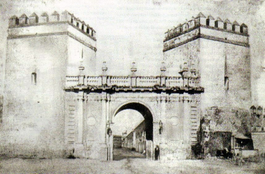 Imagen de la puerta Nueva o de San Fernando (Sevilla). Hoy derribada.